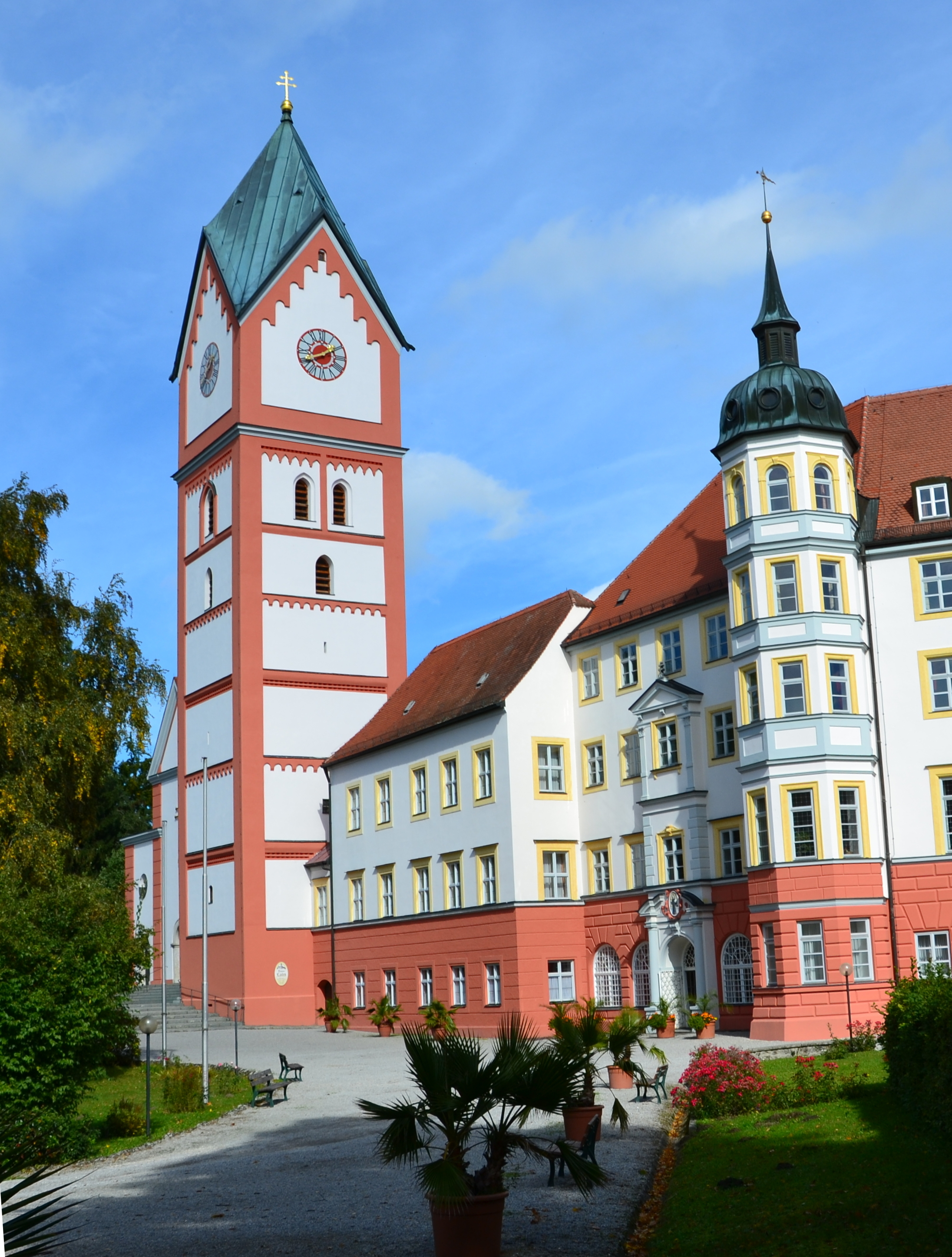 Ansicht Kloster Scheyern Pforte u. Glockenturm